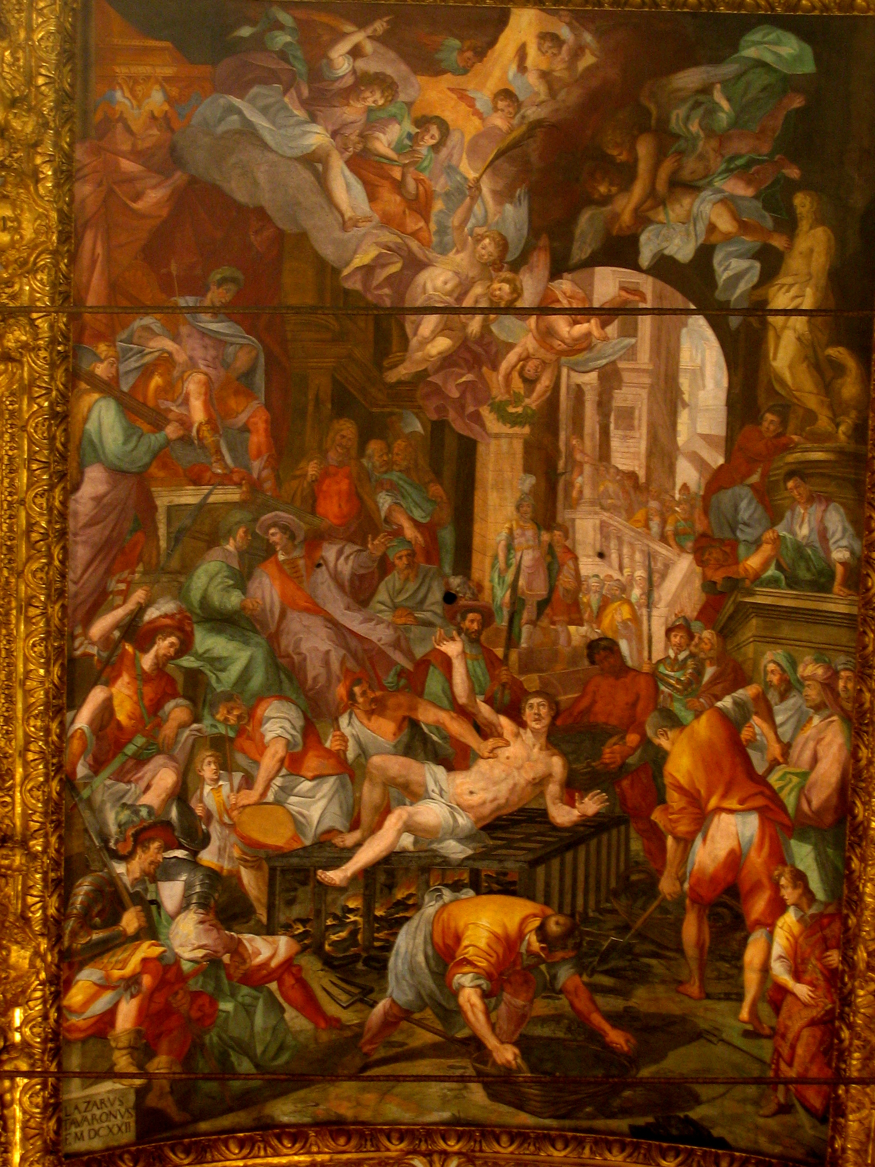 San Lorenzo è bruciato sulla graticola, affresco nella Cattedrale di San Lorenzo a Genova. Firmato da Lazzaro Tavarone, e datato 1622.